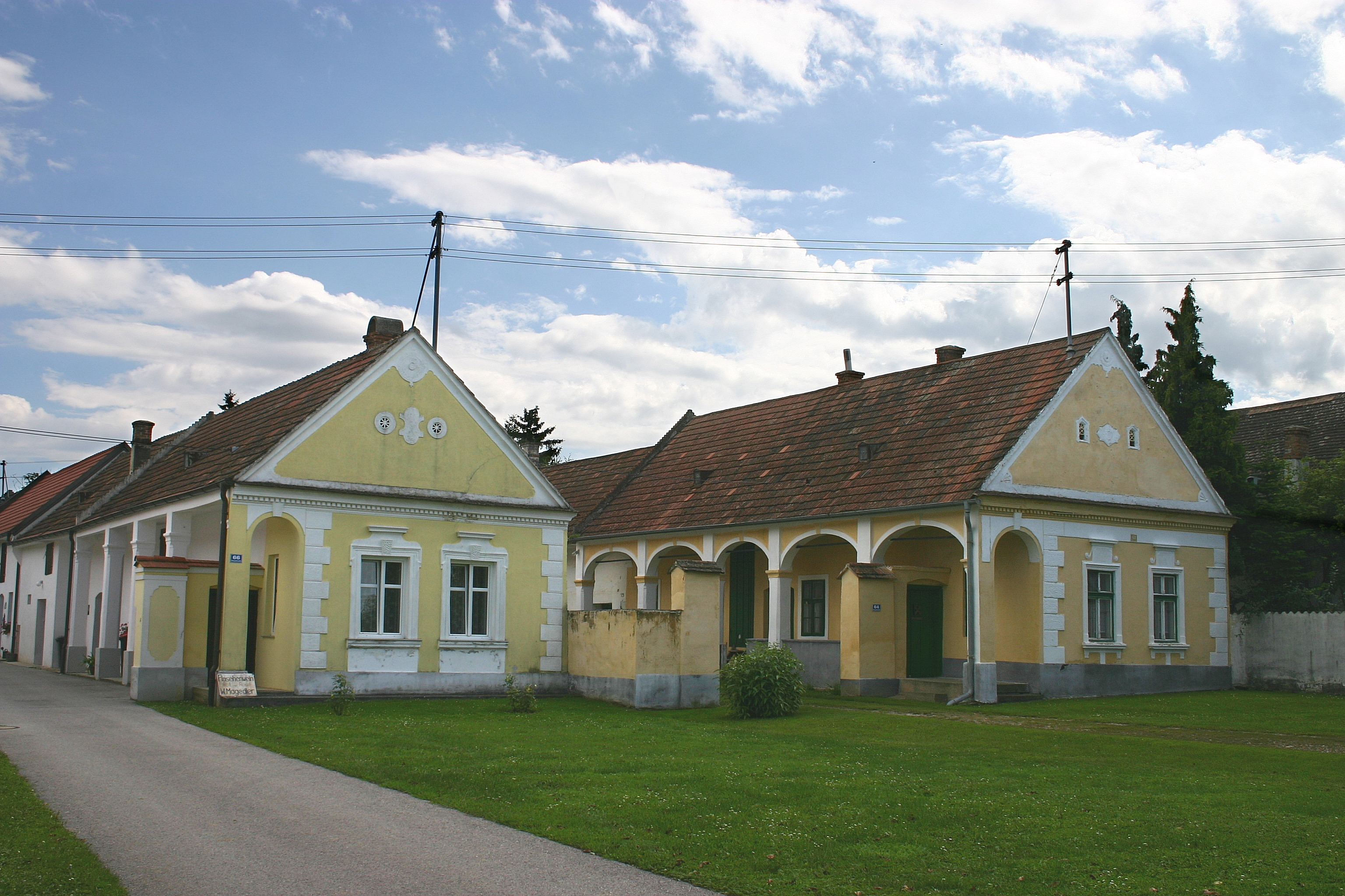 Lutzmannsburg alte Häuser